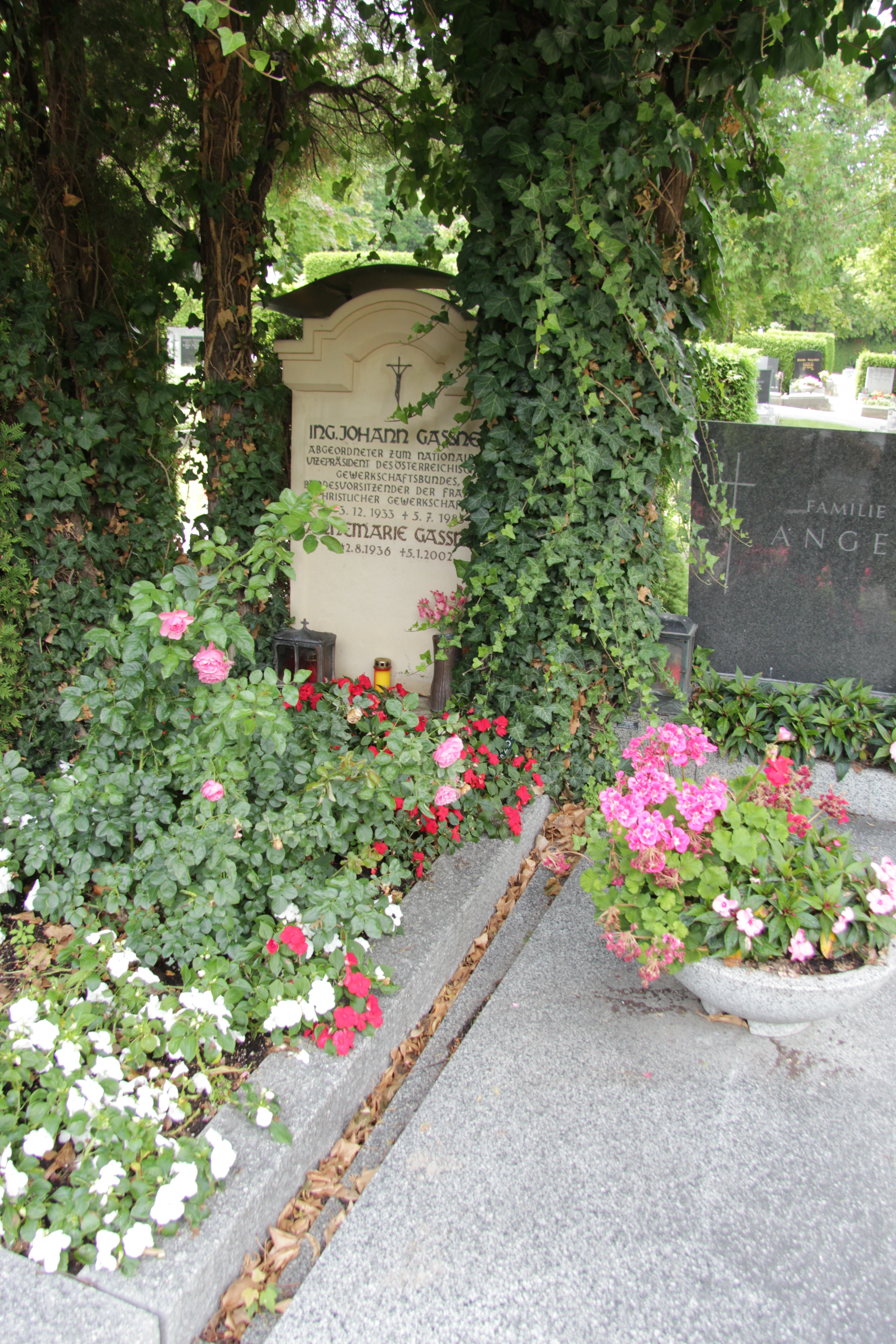 Friedhof in Mödling, Niederösterreich, Grab des Nationalrates Johann Gassner